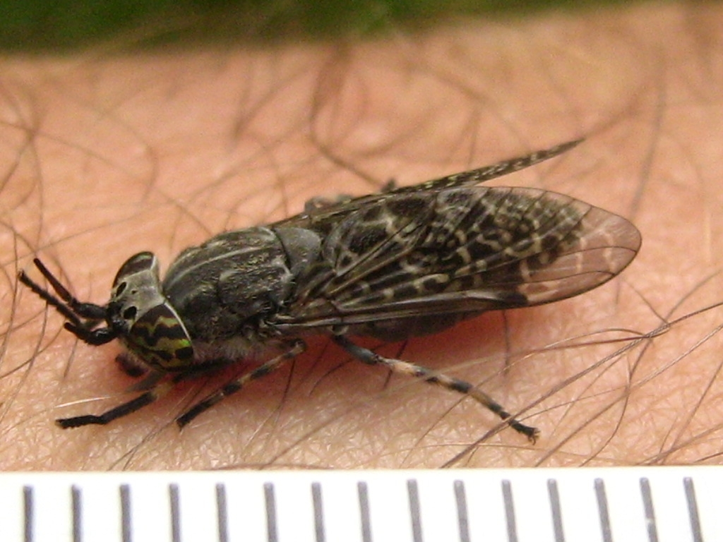 Haematopota pluvialis, die „Regenbremse“ oder „Blinde Fliege“. Früherer wiss. Name Chrysozona pluvialis L.. Fotografiert in einem Wald bei Nauen (Brandenburg). Zum Größenvergleich ist am unteren Bildrand die Millimetereinteilung eine Lineales zu sehen.